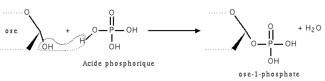 Formation d'un ose-1-phosphate. Mars 2005 Création personnelle.